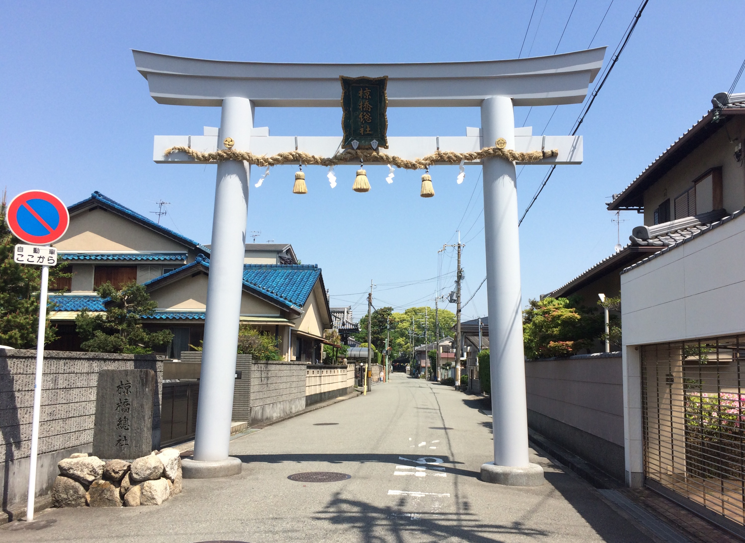 椋橋総社の鳥居